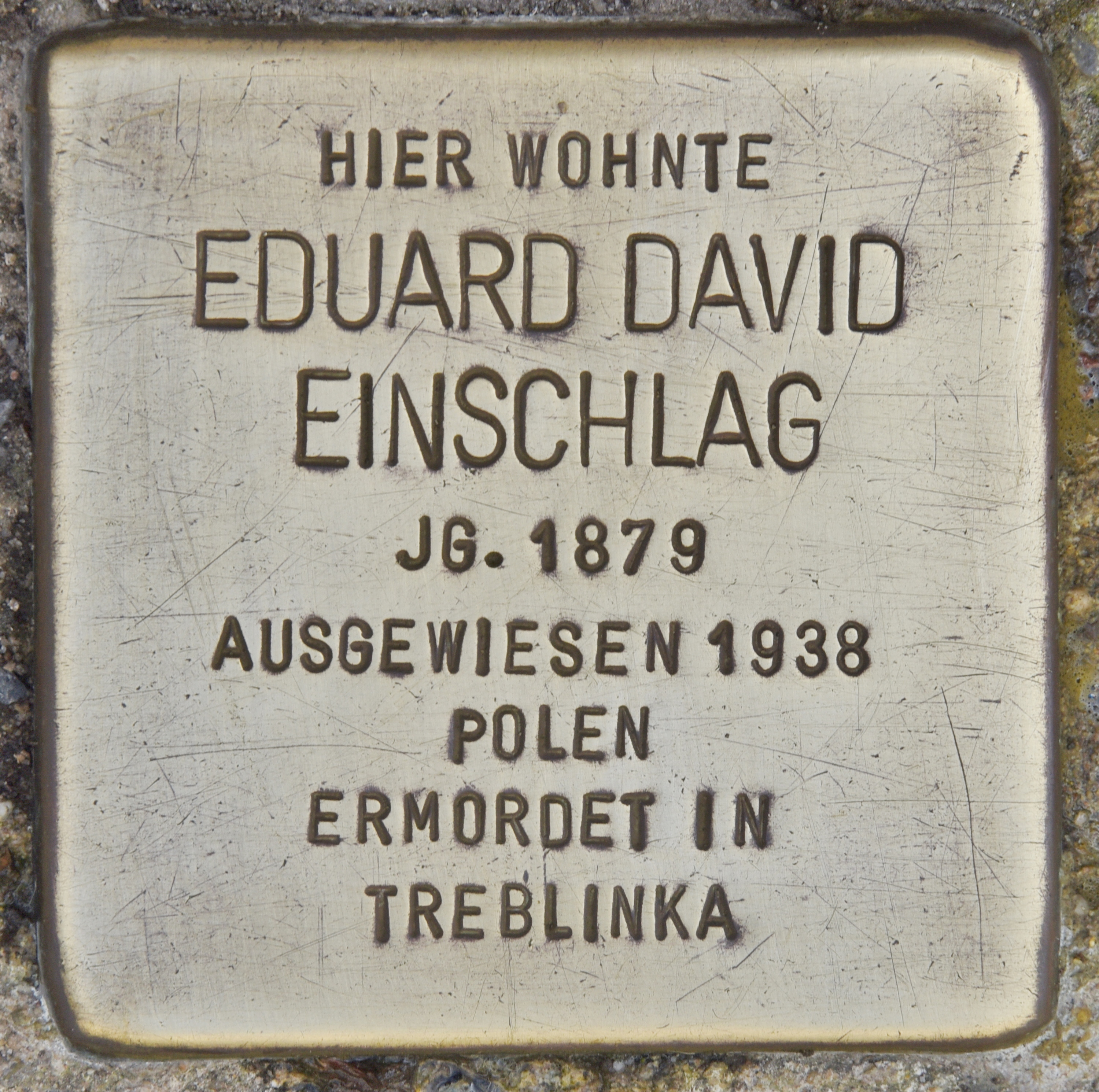 Stolperstein für Eduard David Einschlag, vor Thomasiusstraße 32 in Leipzig